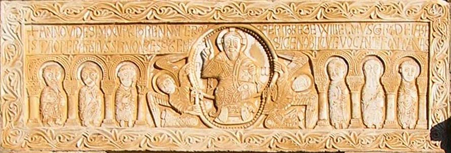 Le linteau de l'abbaye de Saint-Génis-des-Fontaines. Photographie personnelle (2006).